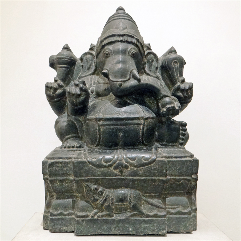 Ganesh (Ganesha, Ganesa, Ganapati) Tamil Nadu XVè-XVIè siècle Granit musée national des arts asiatiques, musée Guimet